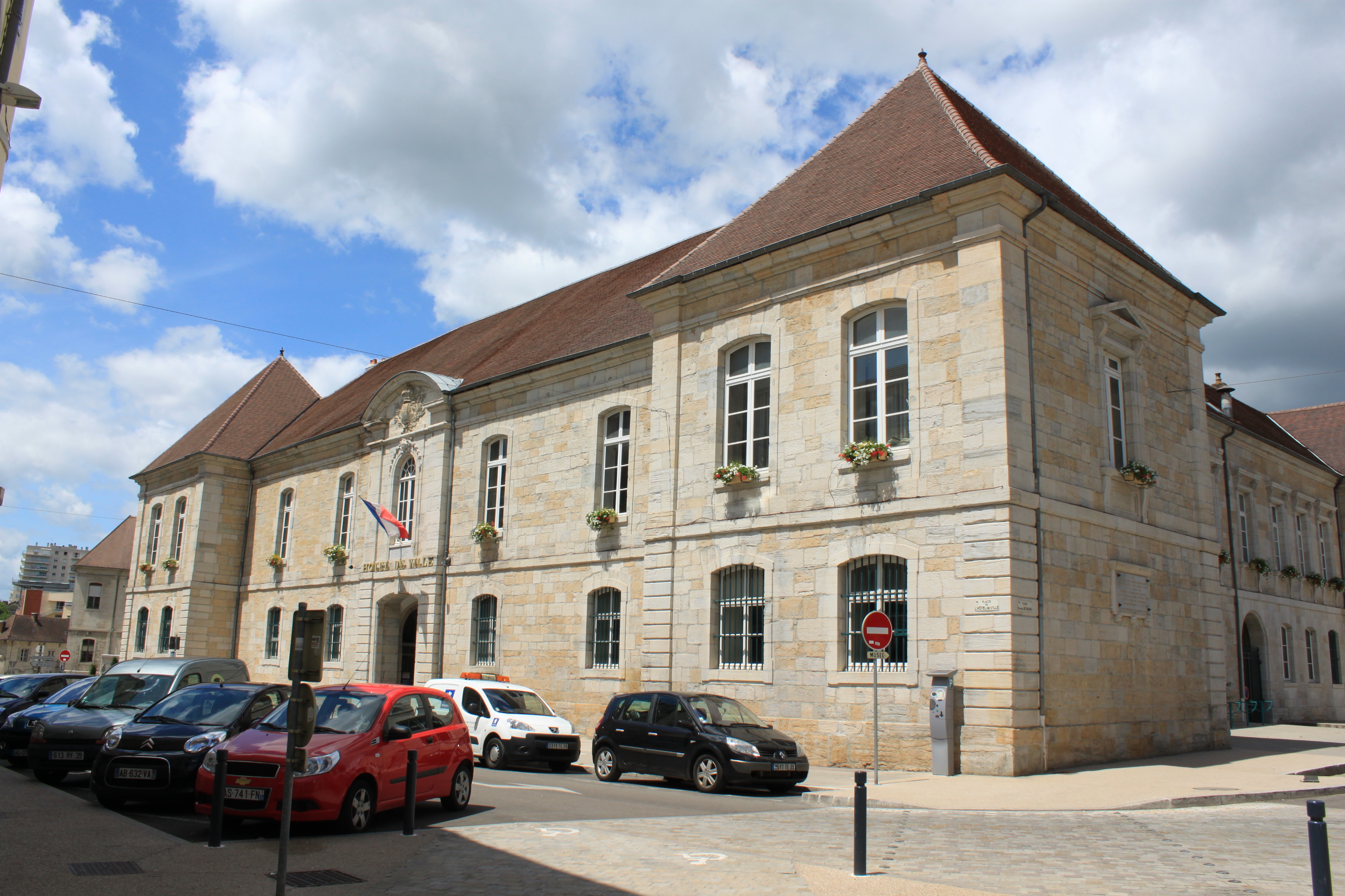 Lons-le-Saunier, Franche-Comté, France